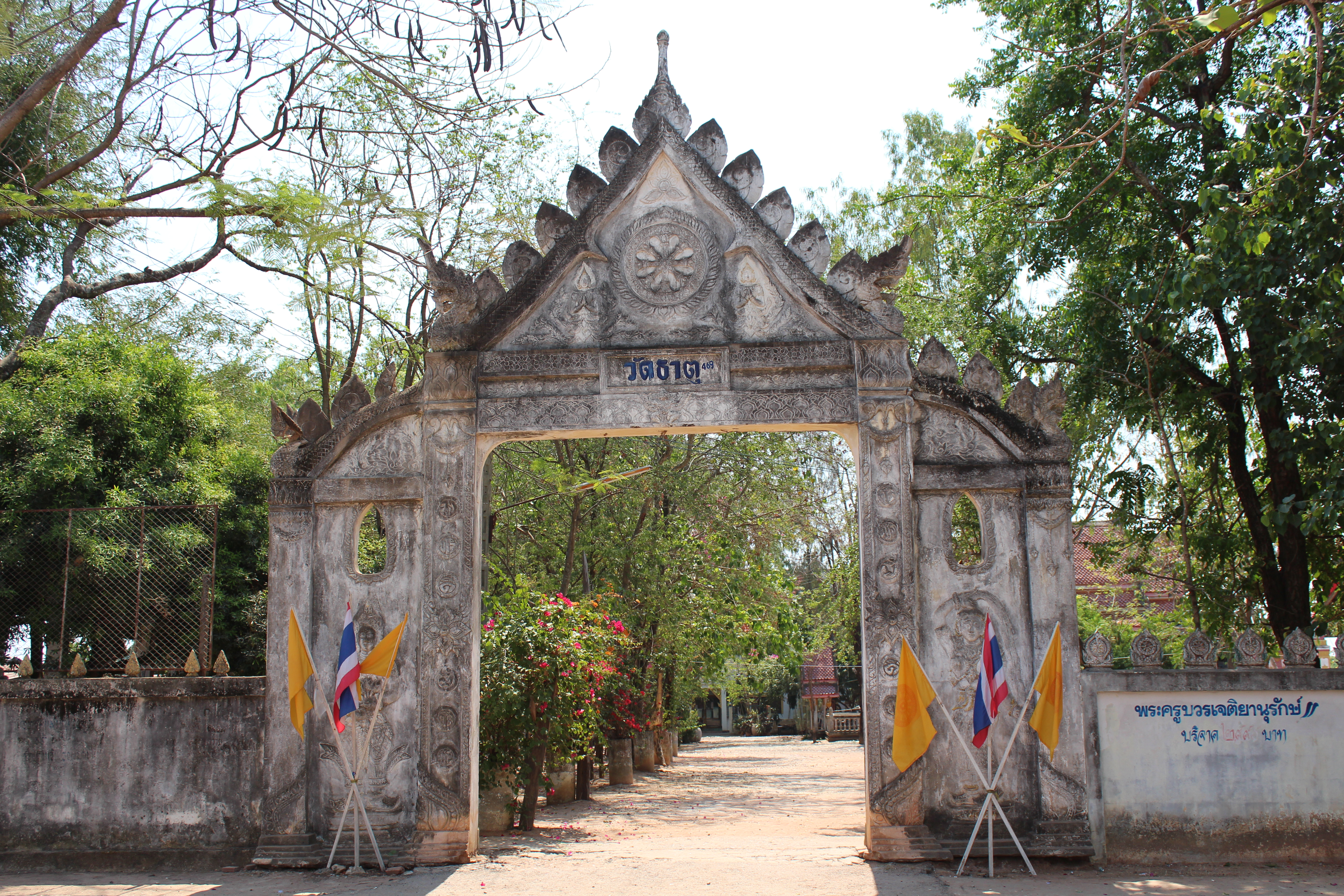 ชุ้มประตูโขง วัดธาตุ